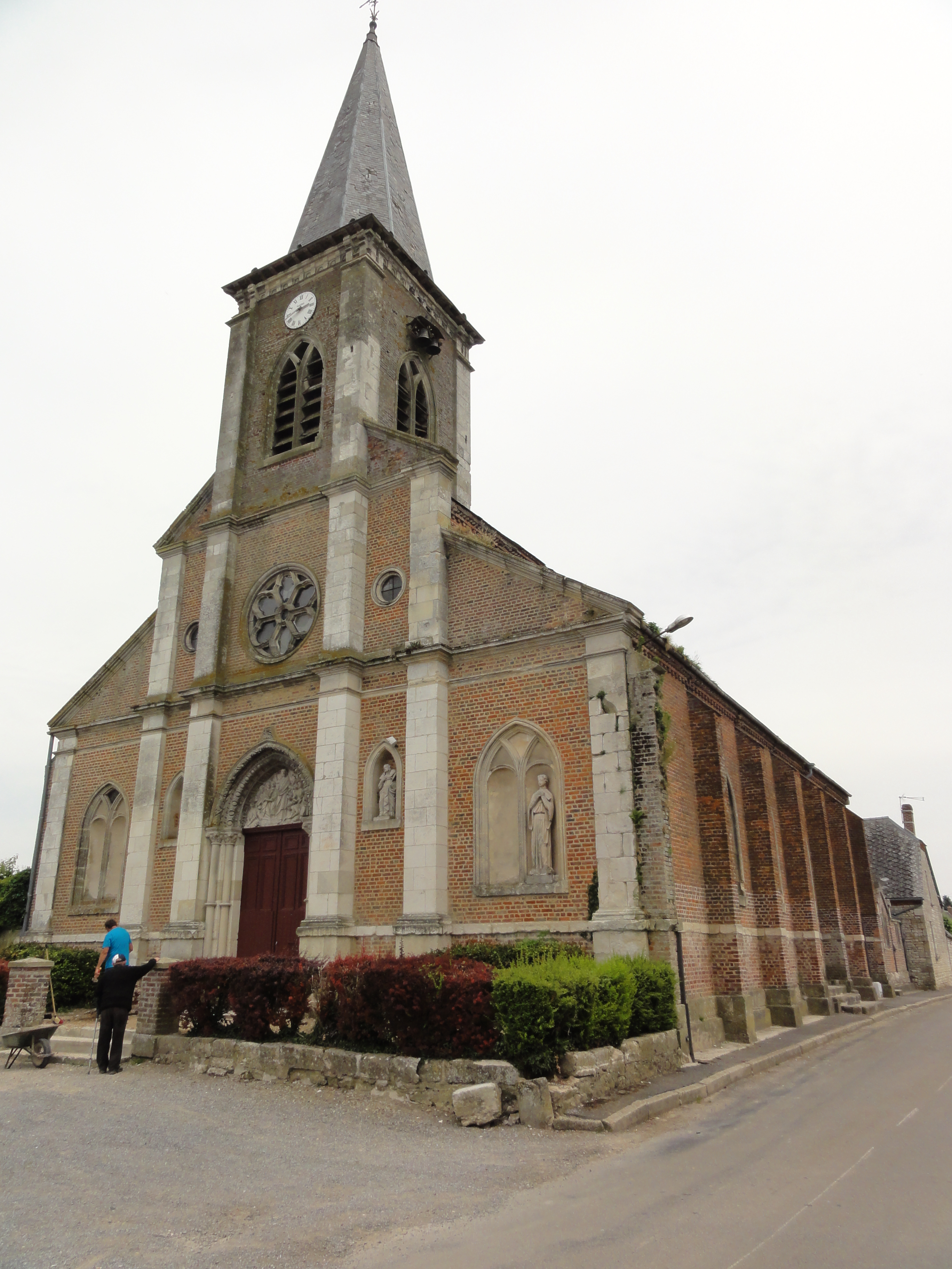 La Ville-aux-Bois-lès-Dizy (aisne) Église Saint-Fiacre-et-Saint-Blaise